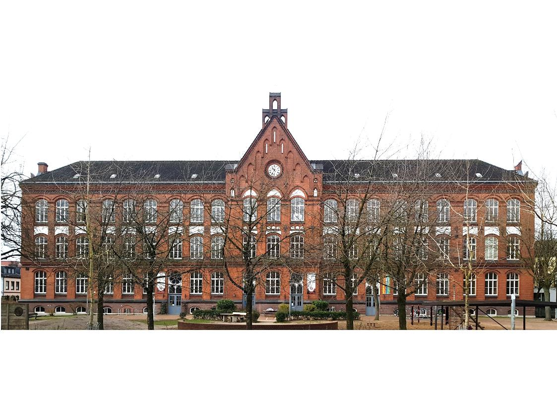 Ehemalige Reformschule in der Schleswiger Straße in Bremen (Walle)